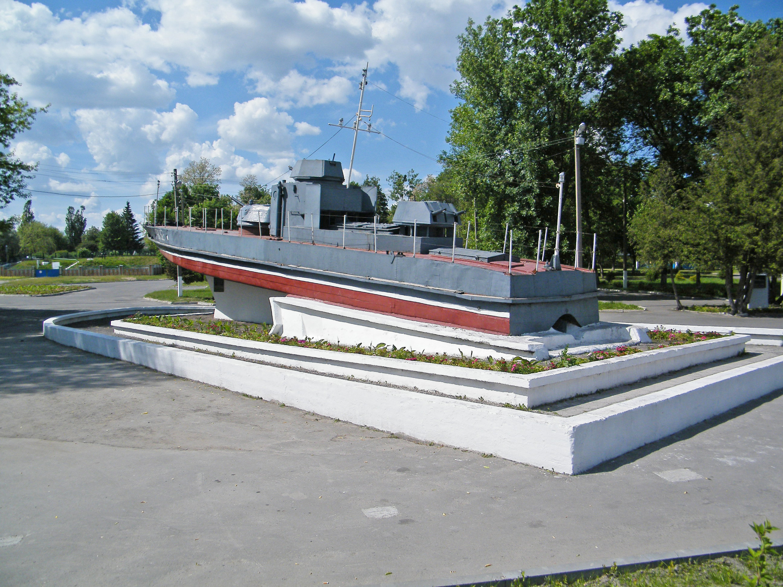 Памятник Пинскому десанту